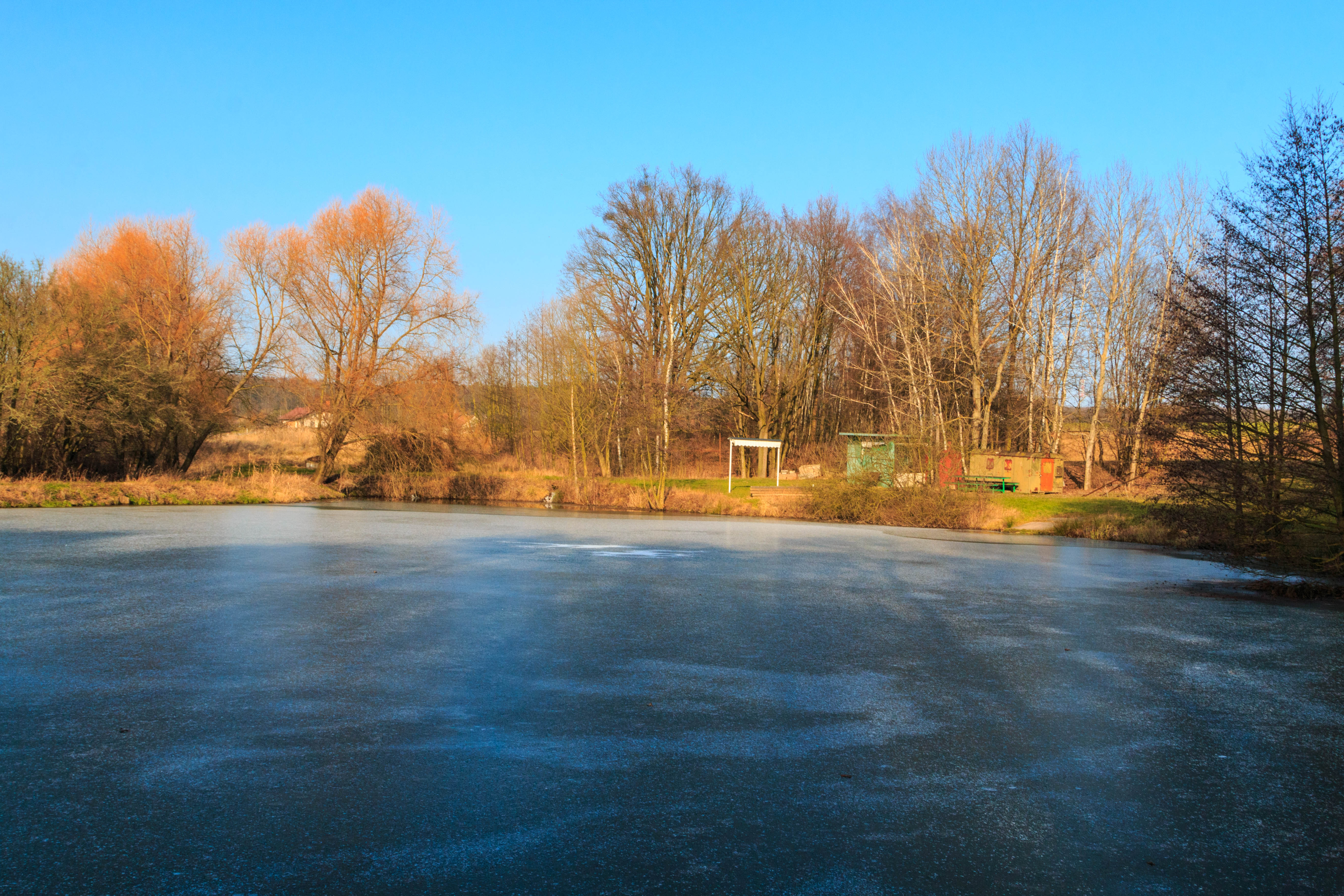 Rybníček Durasko u obce Pravy Project: Vodstvo.